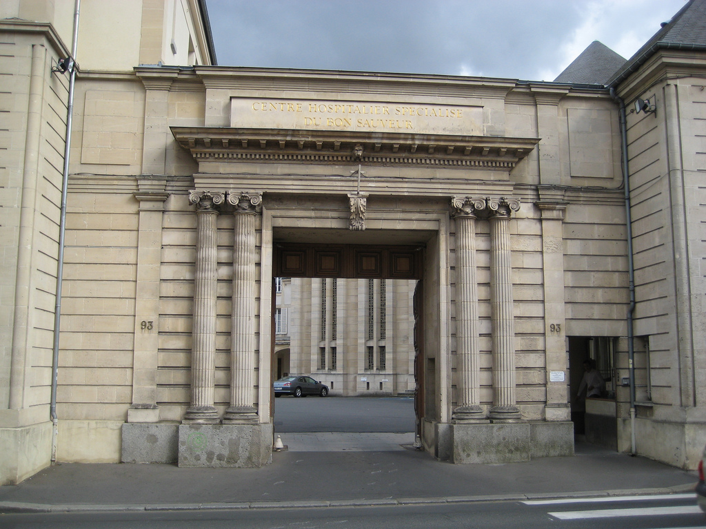 Portail du XVIIIe permettant d'accéder au Bon-Sauveur